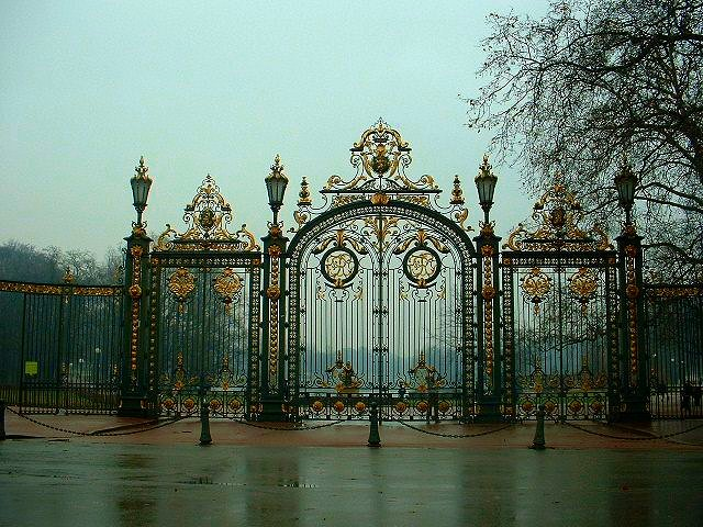 Portail du parc de la Tête d'Or, Entrée des enfants du Rhône, Lyon